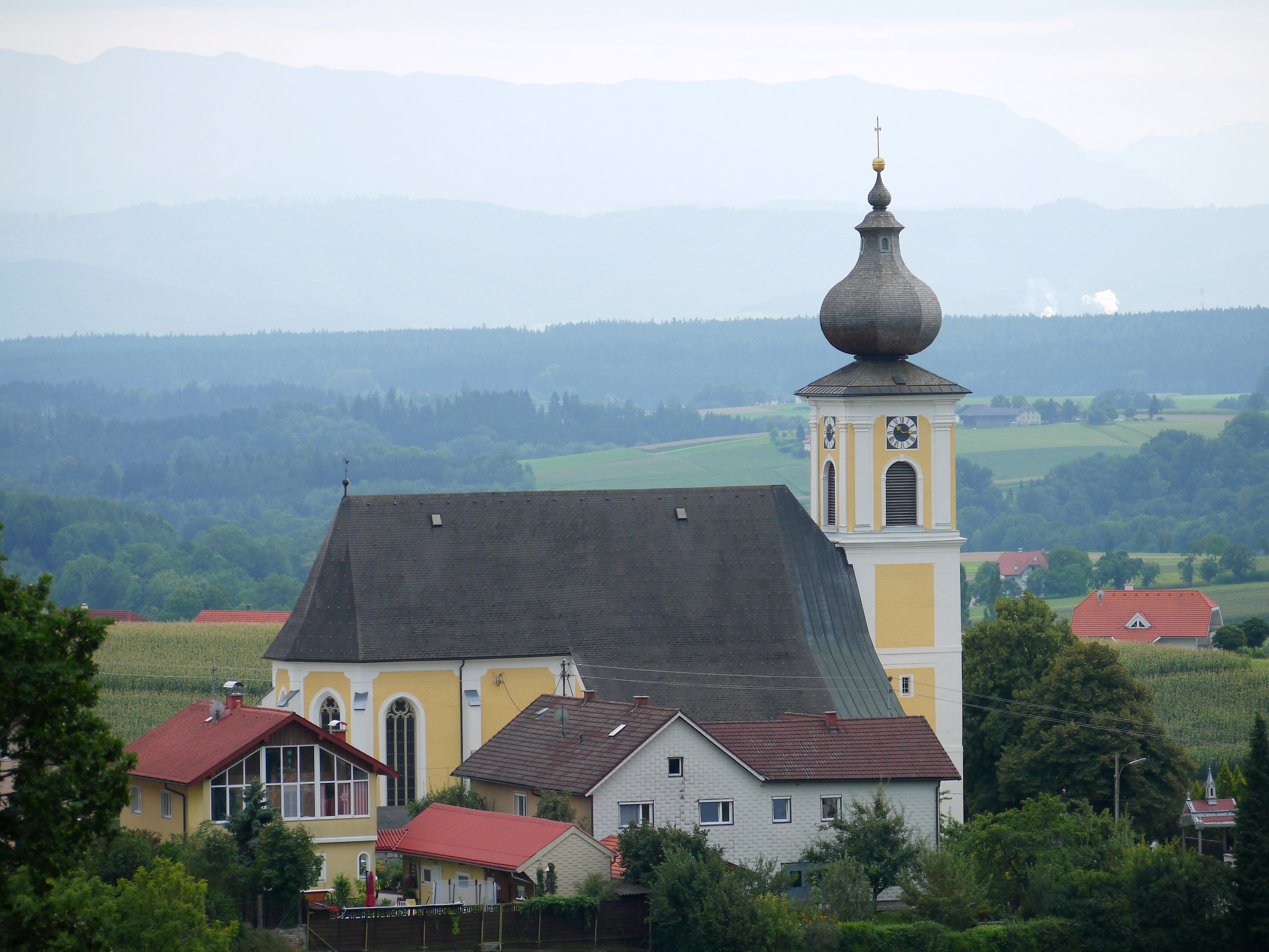 Kath. Pfarrkirche hl. Stephan